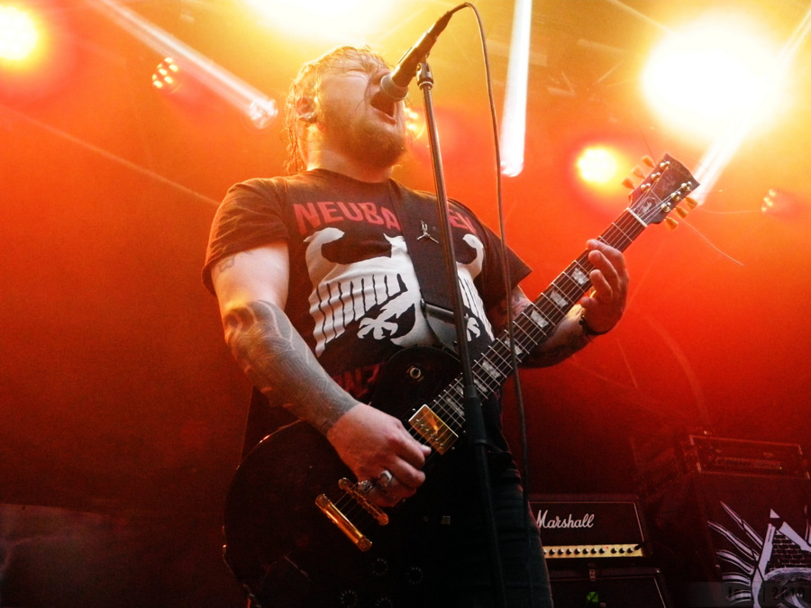 Holden "Bonne" Laamann esinemas ansambliga Pedigree muusikafestivalil Hard Rock Laager 2019.